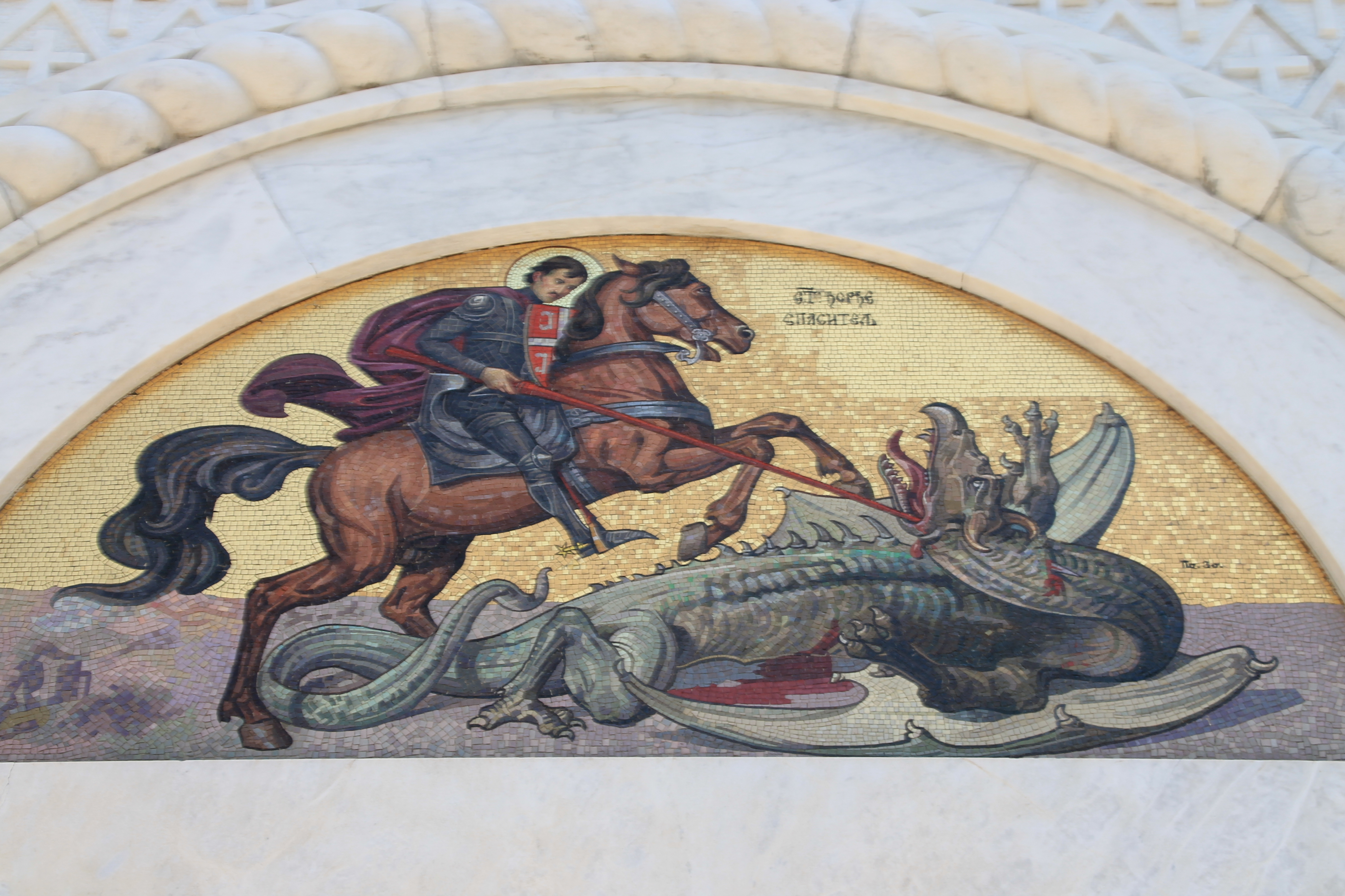 Church of St. George in Topola